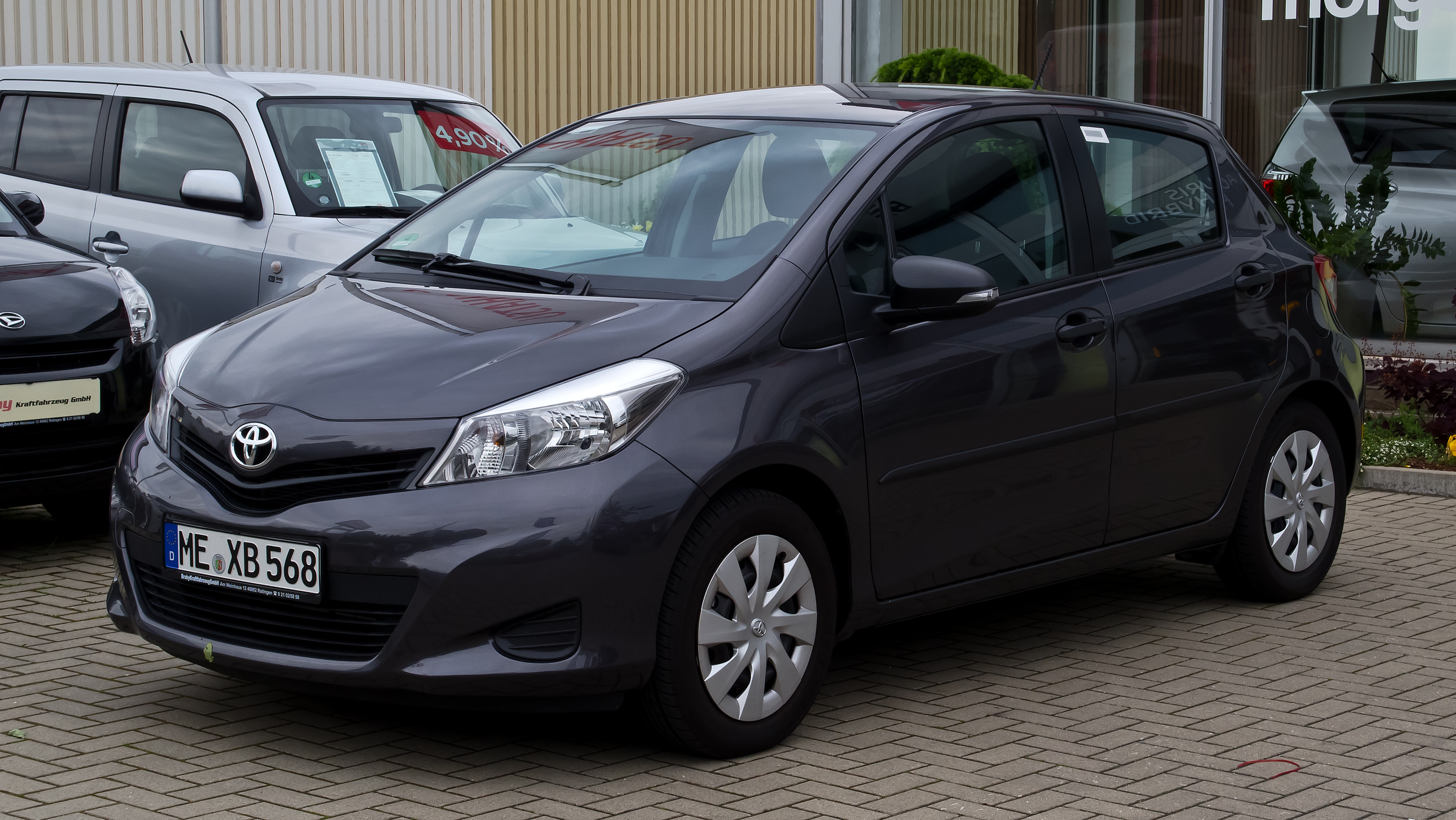 Toyota Yaris 1.0 VVT-i Cool (XP130)